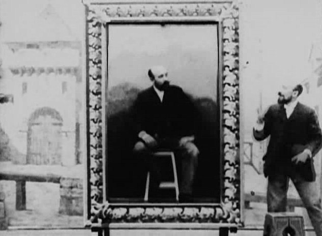 Méliès, Le portrait mystérieux (Star Film 196, 1899)